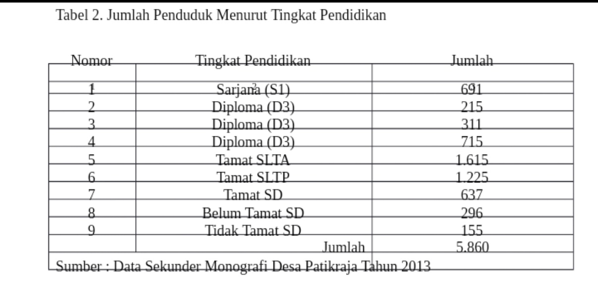 Tabel tingkat pendidikan masyarakat Patikraja 2013